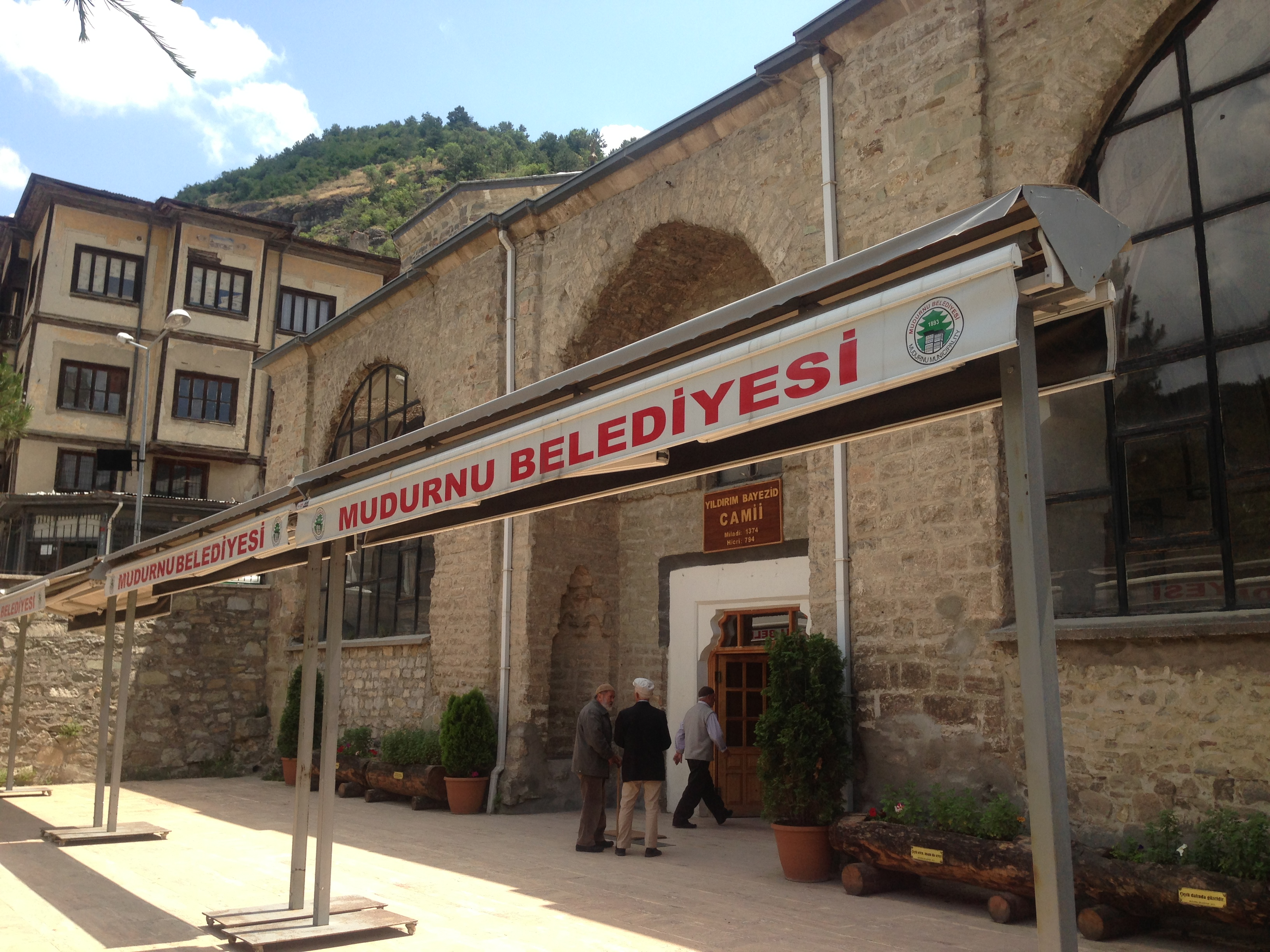 Mudurnu'da Yıldırım Bayezid Camii. 1374 yılında yapılmıştır.